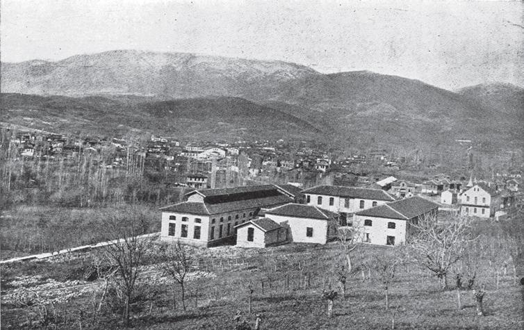 Свиларската фабрика в Гумендже.